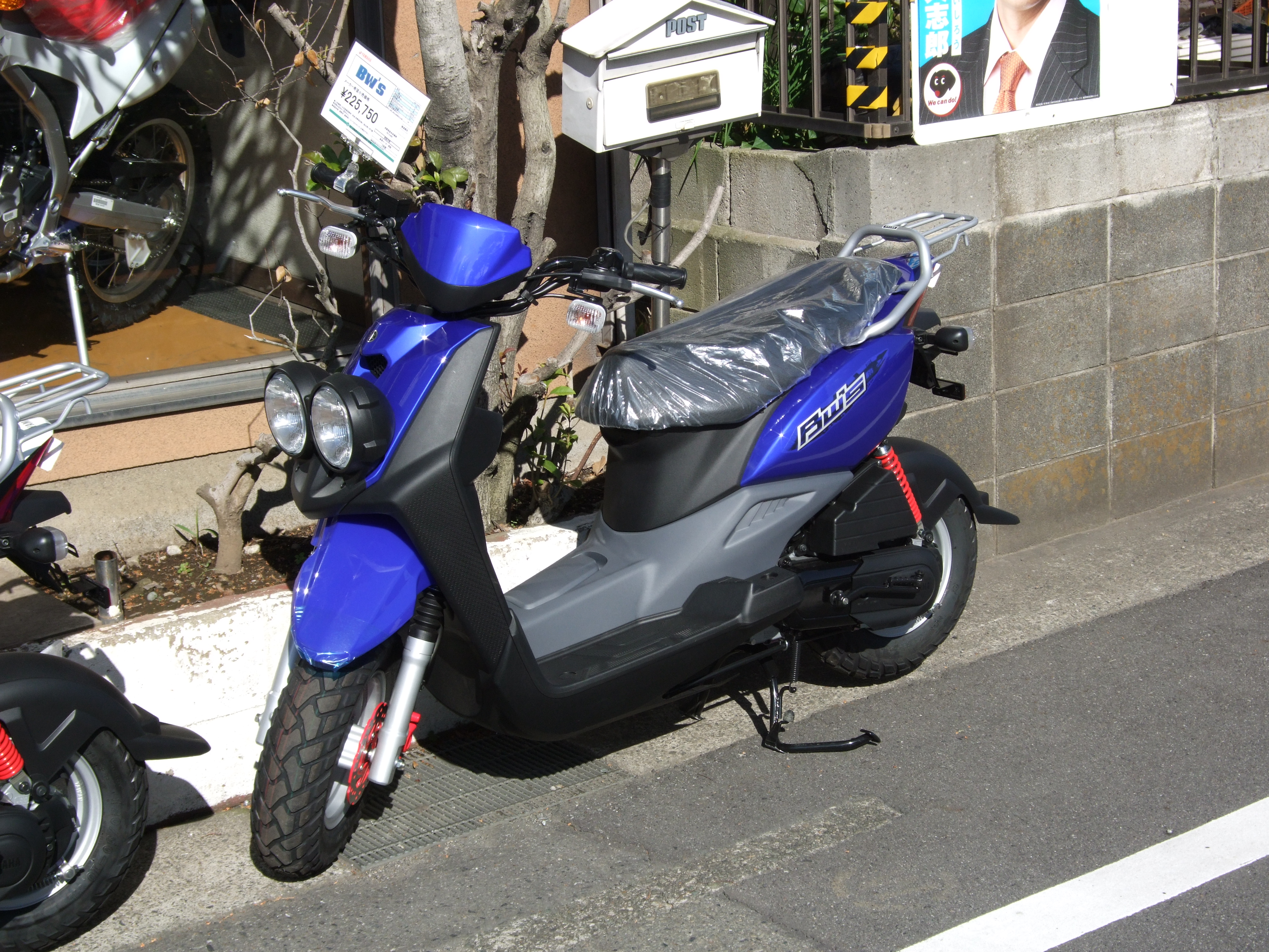 ヤマハBW'S 2012年モデル